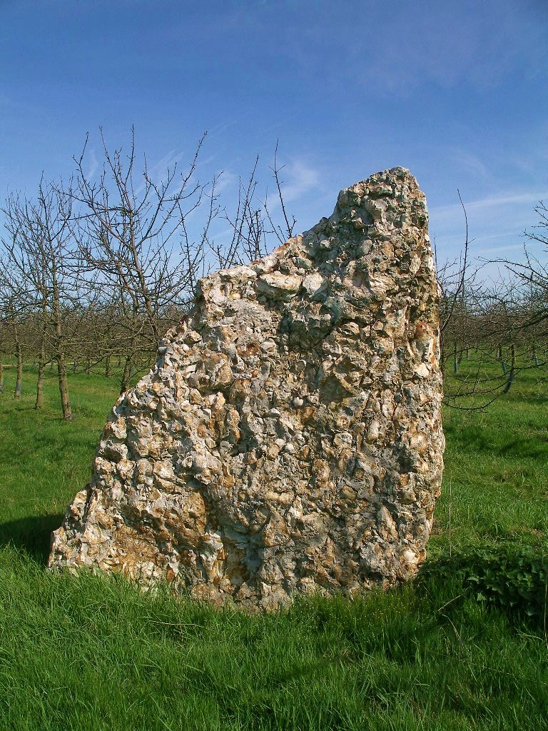 menhir de la Grosse Pierre à Villerville (Calvados)